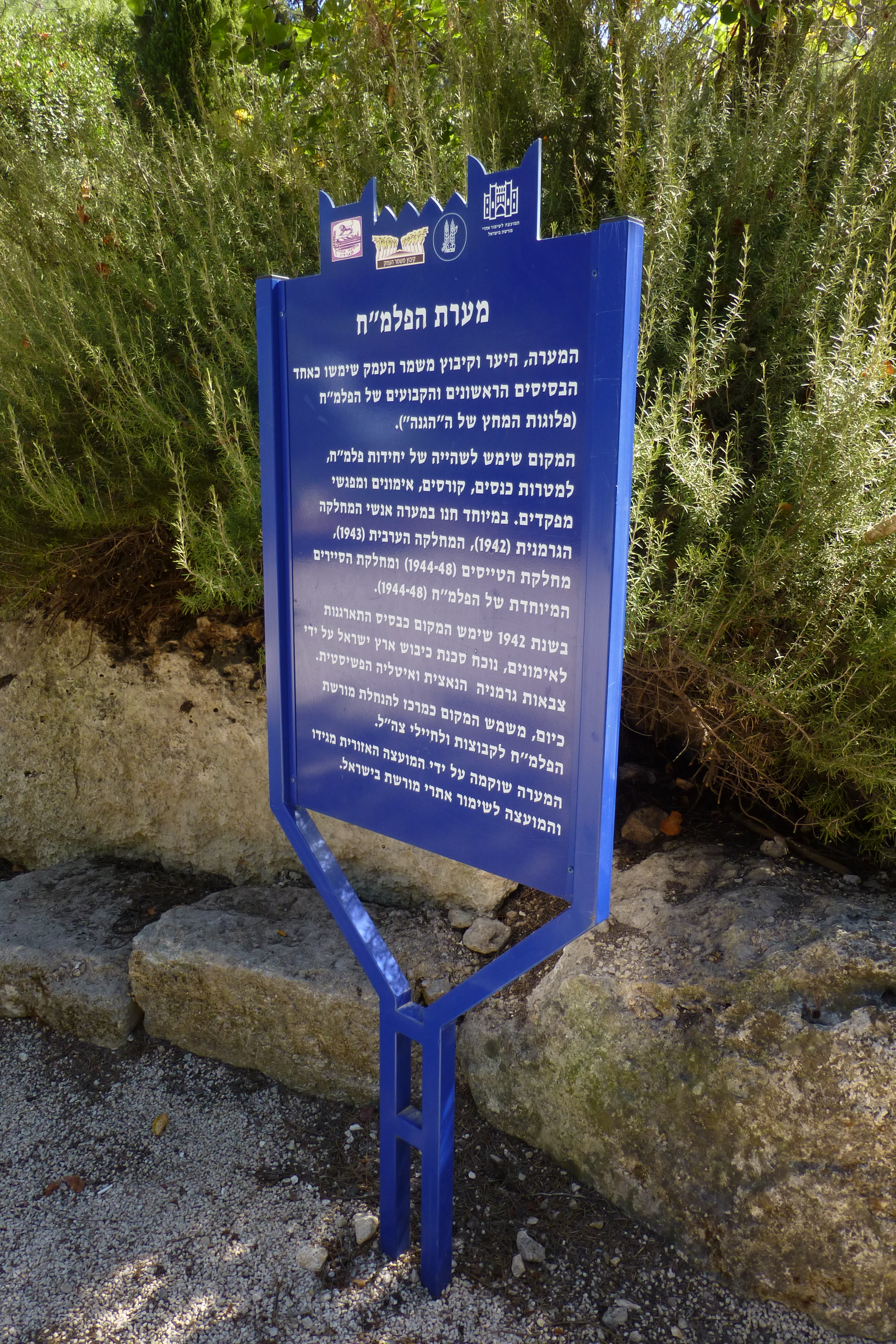 מערת הפלמ"ח במשמר העמק